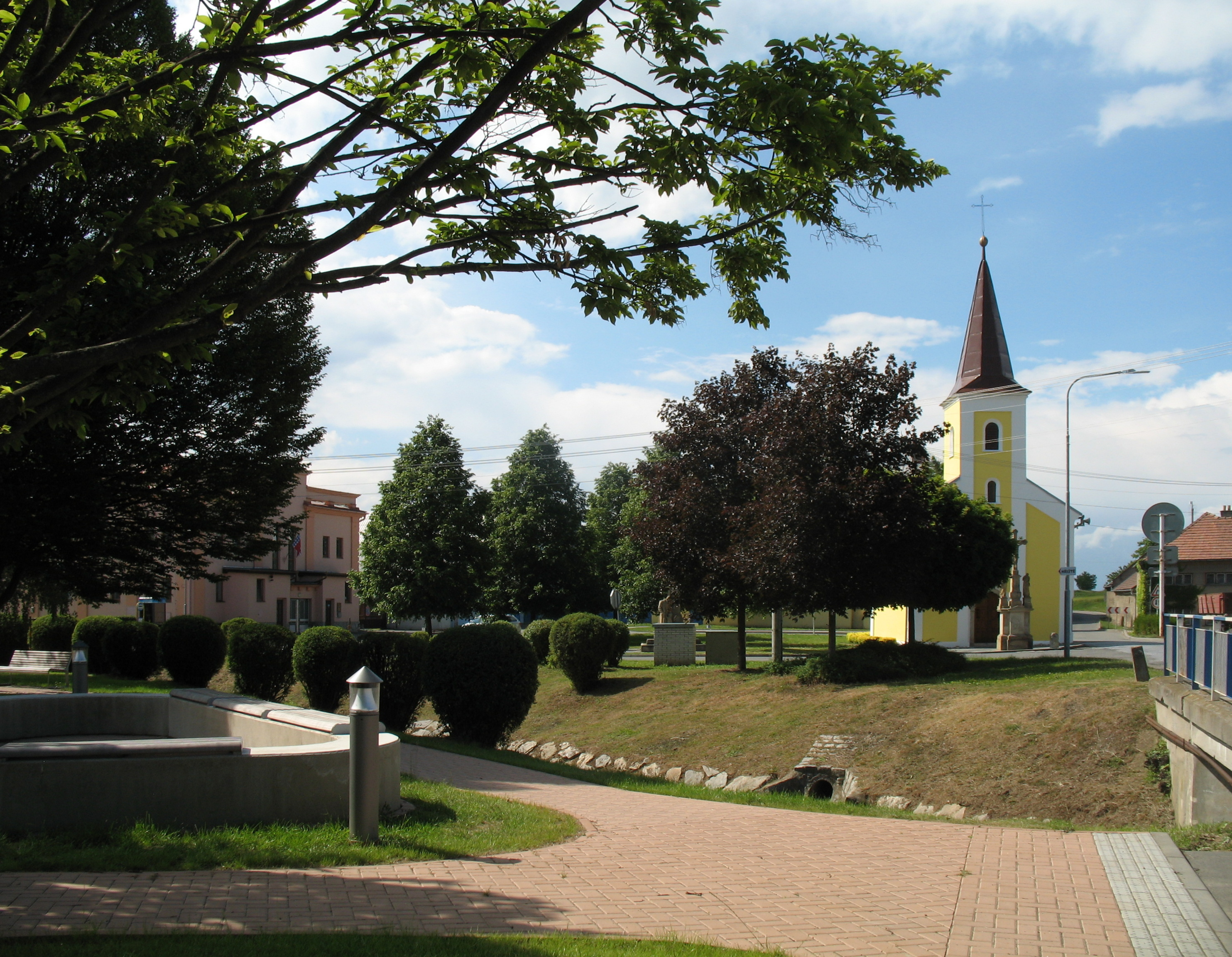 Obec Haňovice v okrese Olomouc